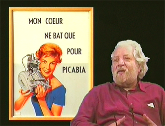 Portrait de Jean-Jacques Lebel